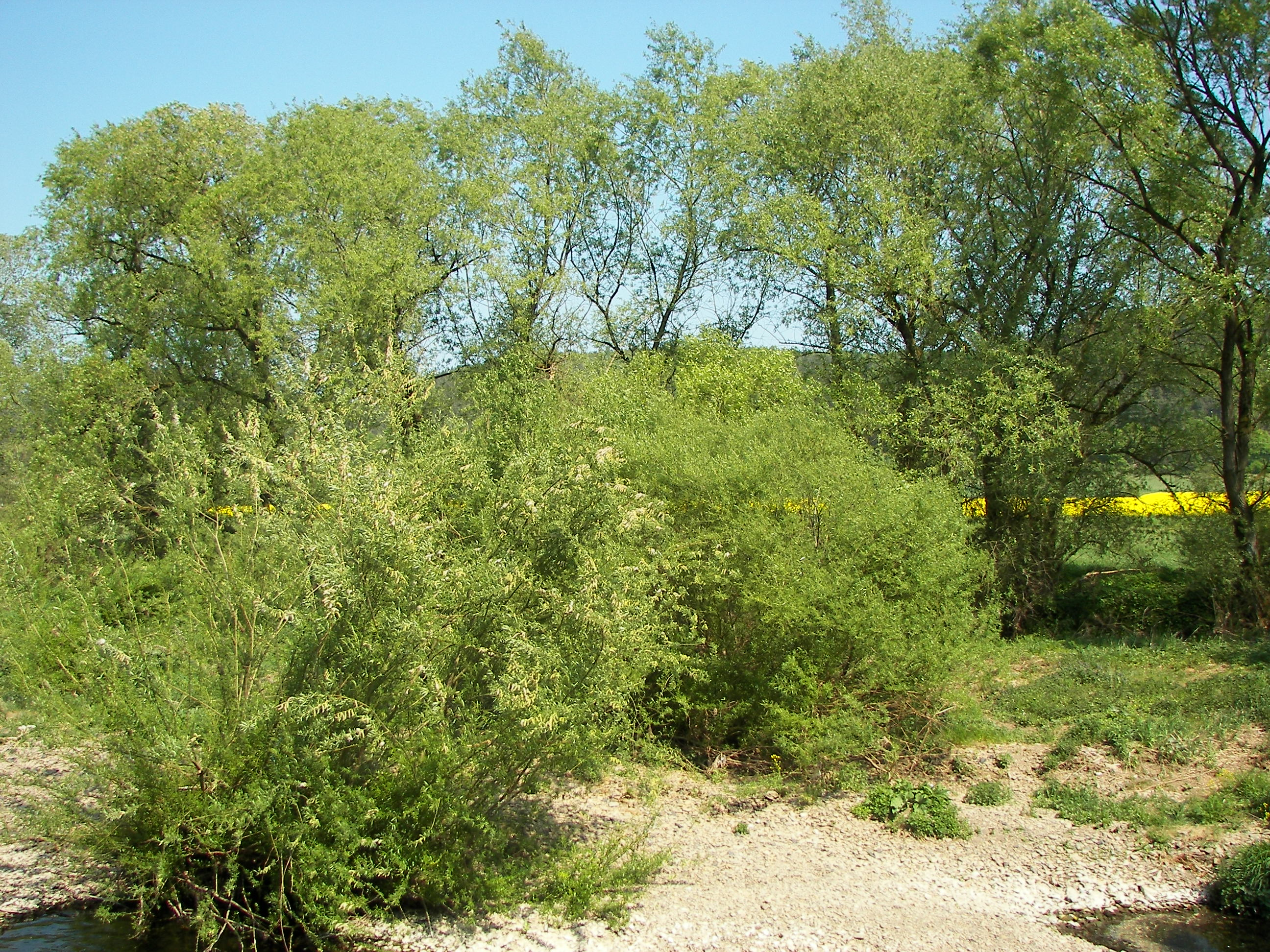 Korbweidengebüsch (Salicetum viminalis) an der Lahn bei Lahntal-Göttingen, LK Marburg-Biedenkopf, Hessen, Deutschland